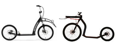 Patinetes de mushing modelo con frenos de disco de Pawtrekker y M 10 con brazo